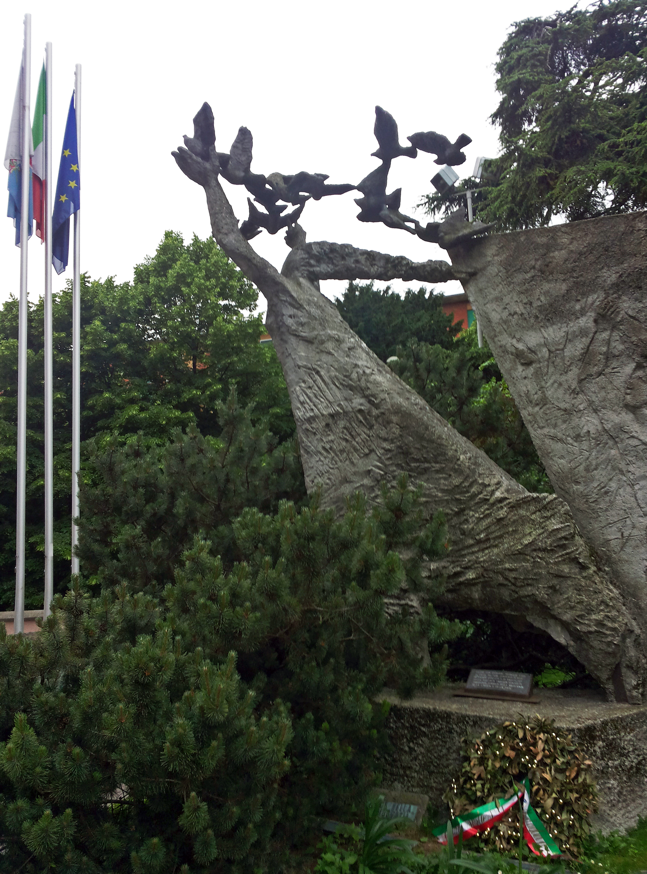 Monumento alla Resistenza di Sesto San Giovanni, statua della Vittoria